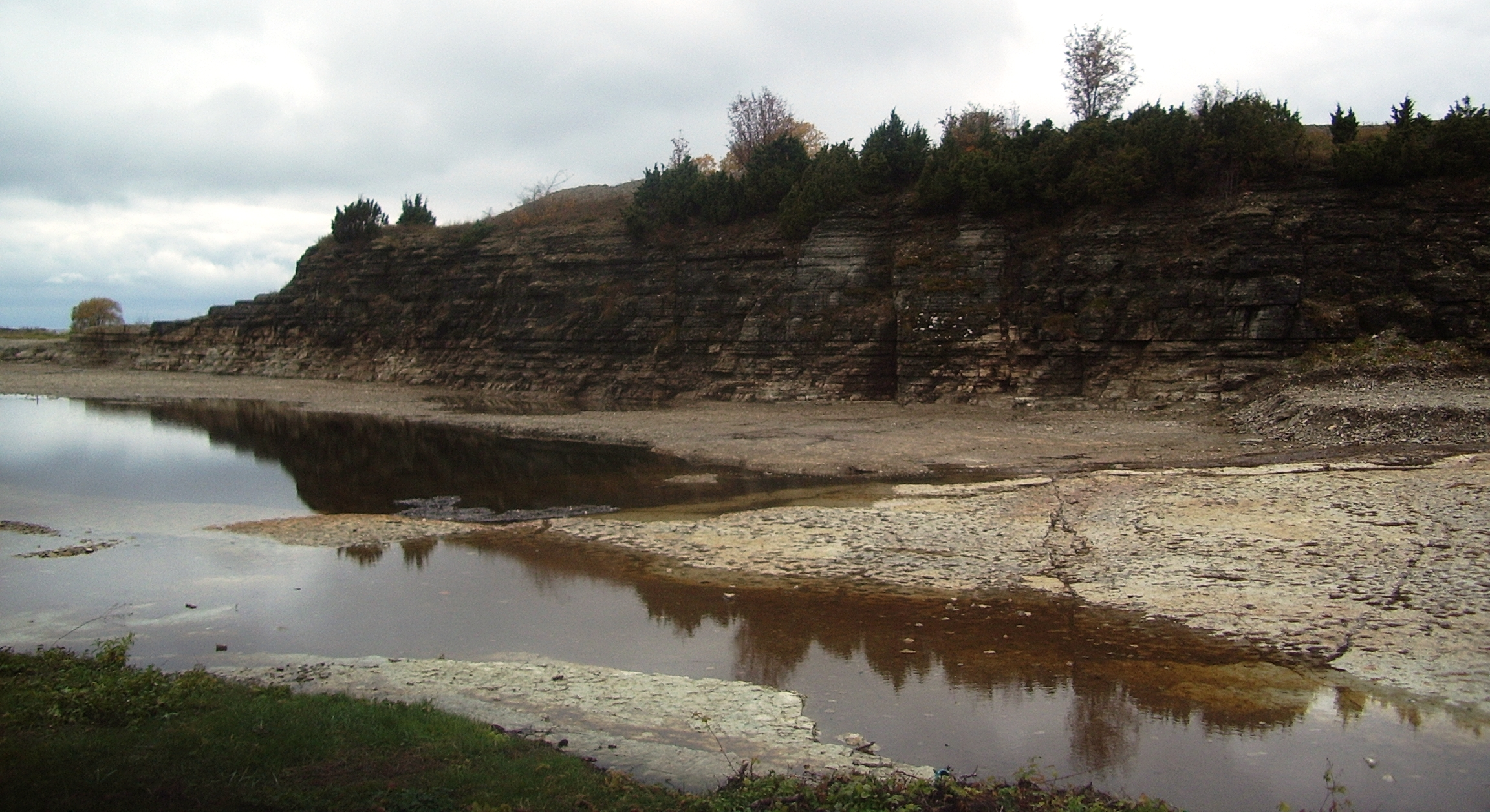 Balti klint Paldiski linnas